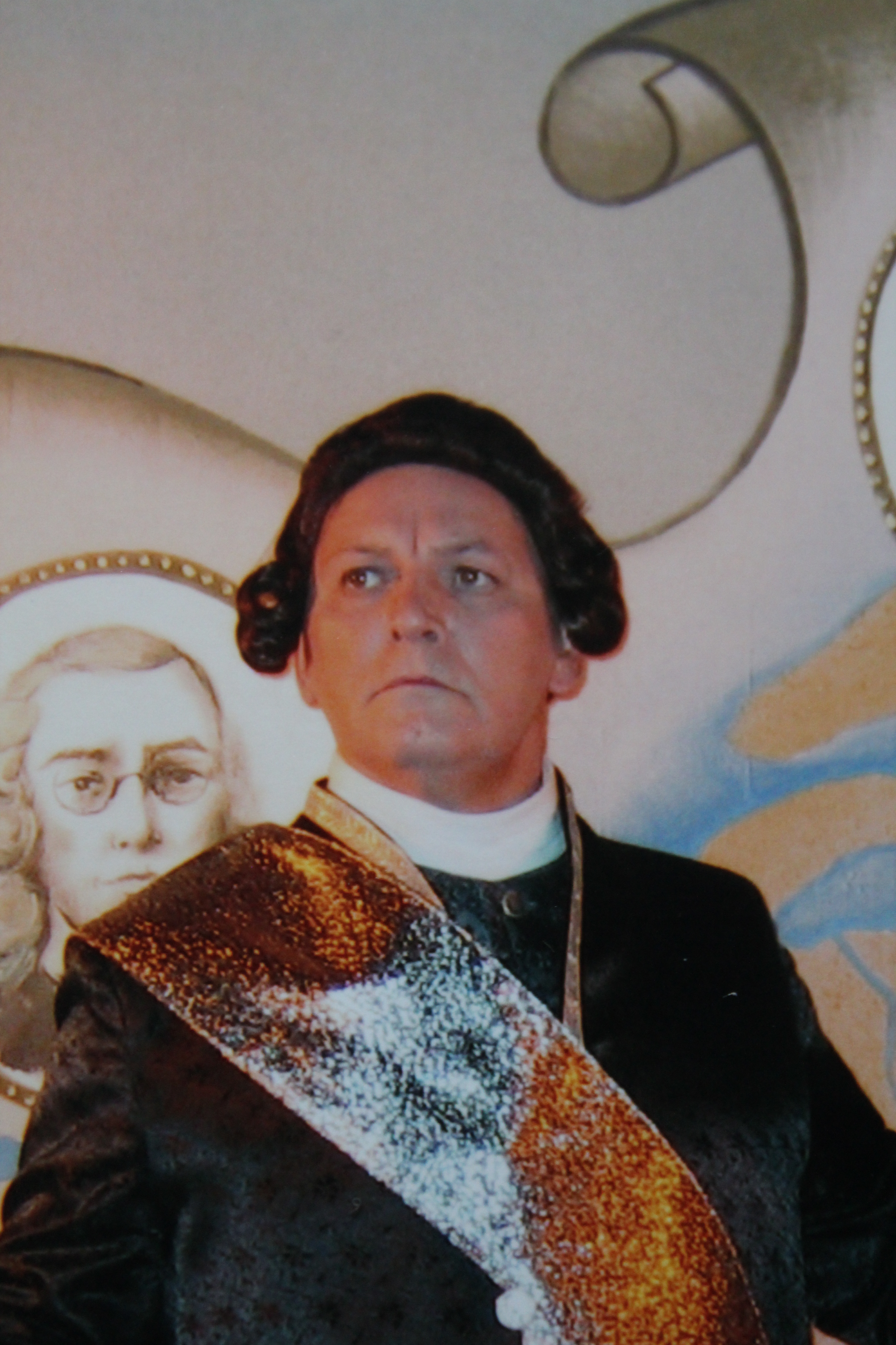 Сцена из спектакля «Любовь и смерть. Мужчины Екатерины Великой» Санкт-Петербургского драматического театра «Патриот» РОСТО. В роли Григория Орлова Геннадий Егоров. Режиссёр-постановщик Геннадий Егоров.